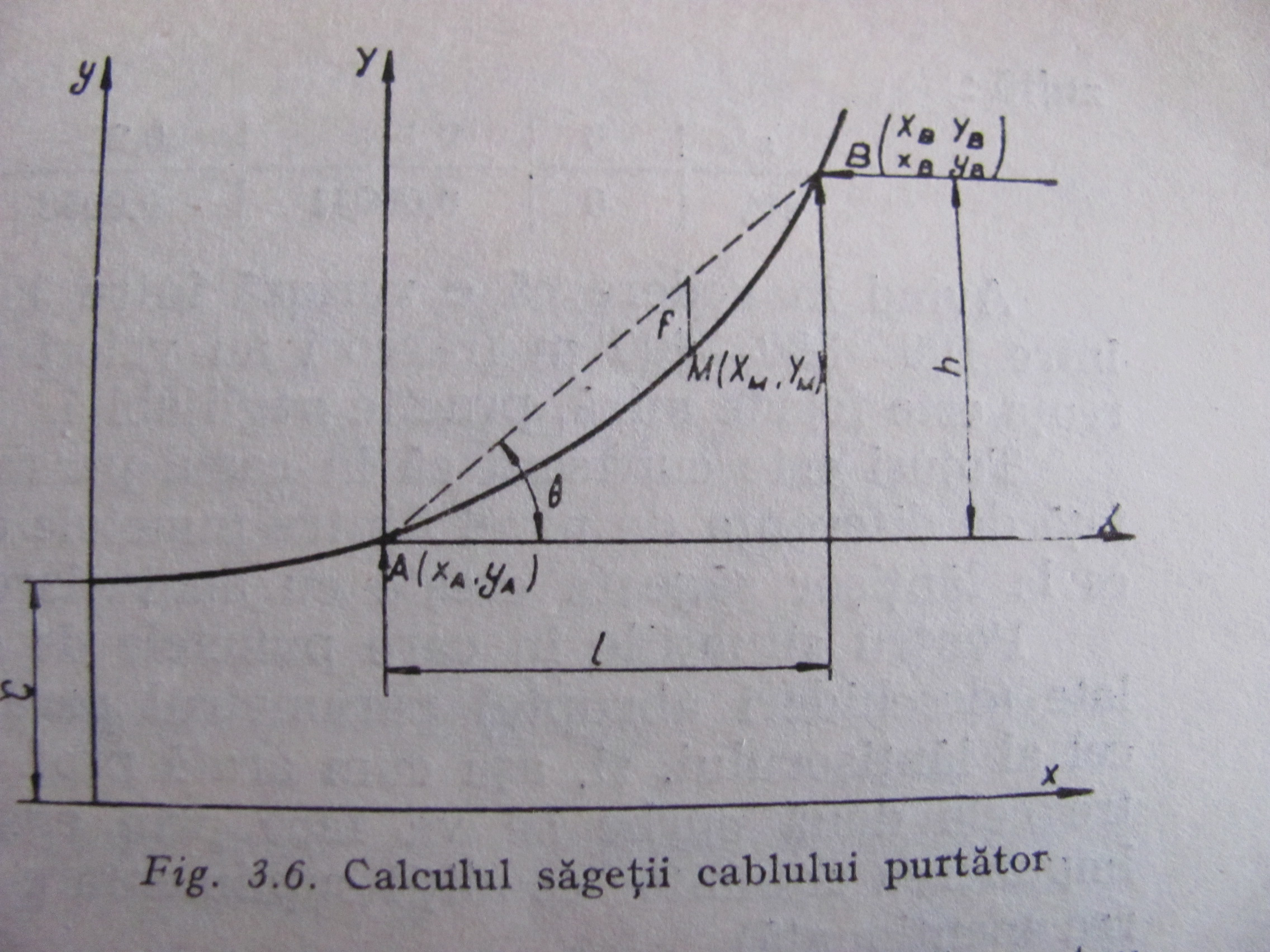 DIangrama calculului sagetii in cazul static al parabolei